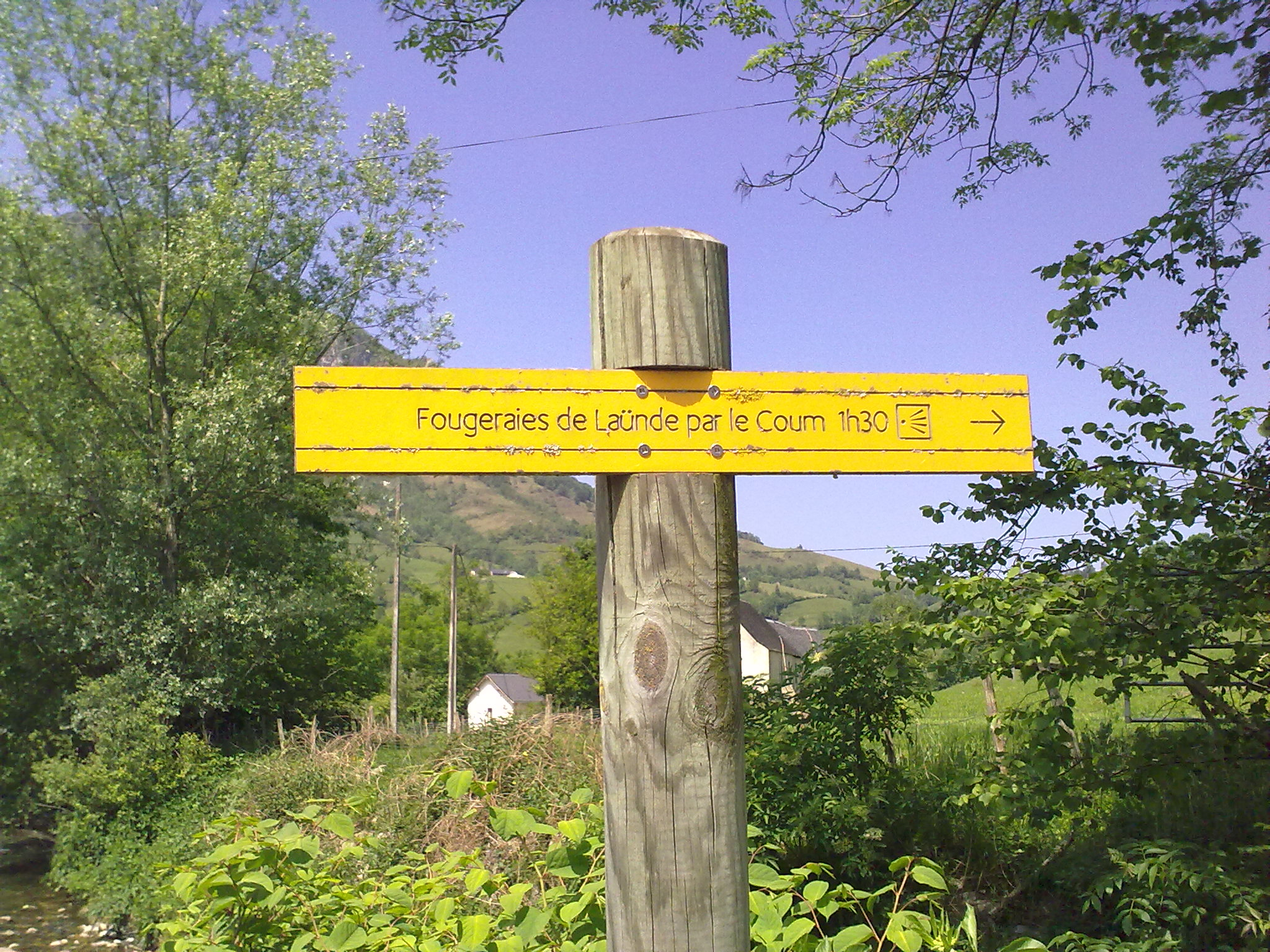 Lourdios-Ichère, France, le 23 mai 2010.